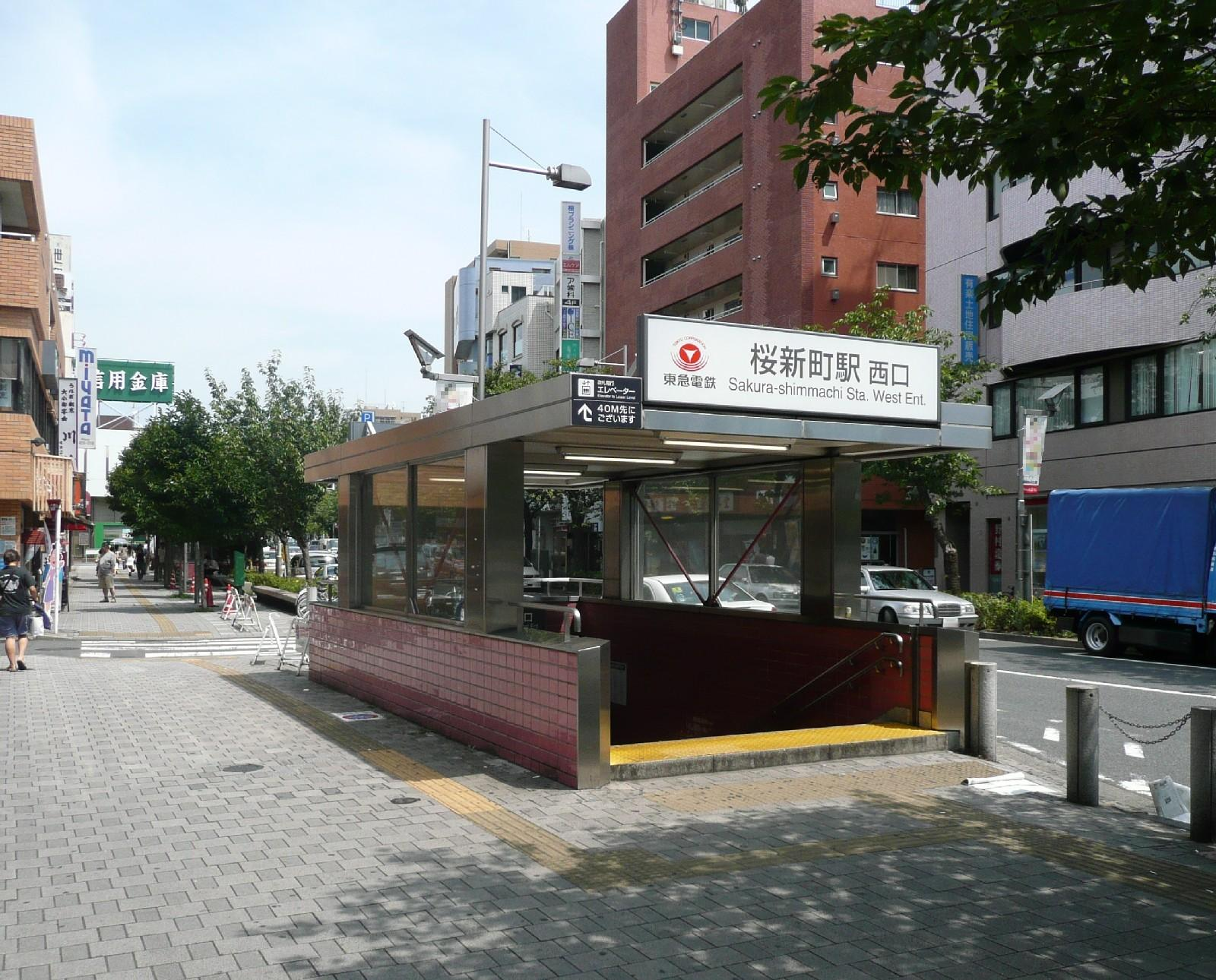 桜新町駅西口